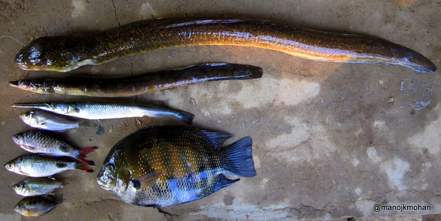 മലഞ്ഞീൽ - Anguilla_bengalensis ആരൽ - Mastacembelus കോല /കോലാന്‍ - Xenentodon_cancila പച്ചമുള്ളന്‍ പൂവാലിപ്പരൽ - Dawkinsia Filamentosa കരിപ്പിടി - Anabas testudineus കരിമീൻ - Etroplus suratensis